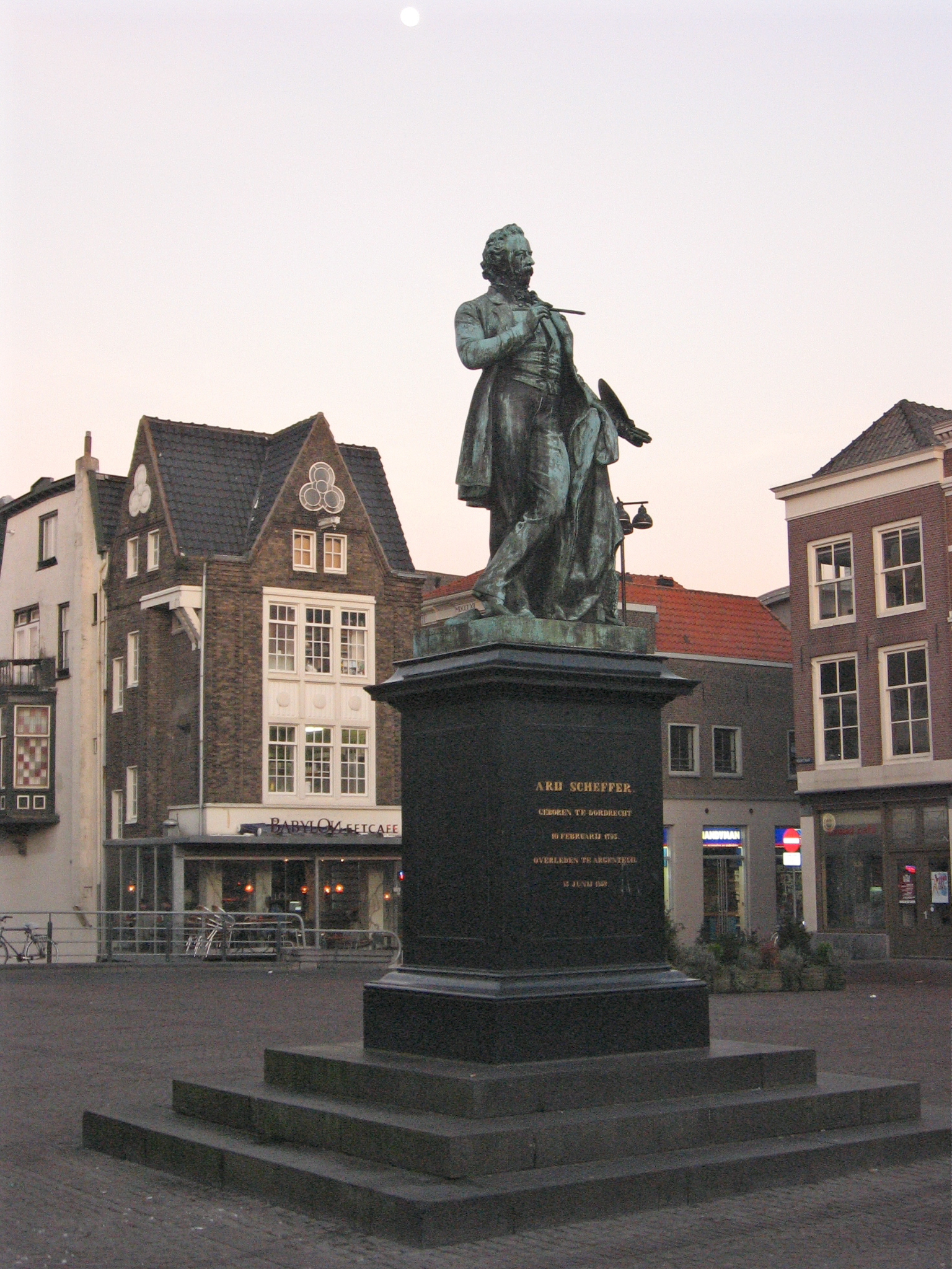 Scheffersplein